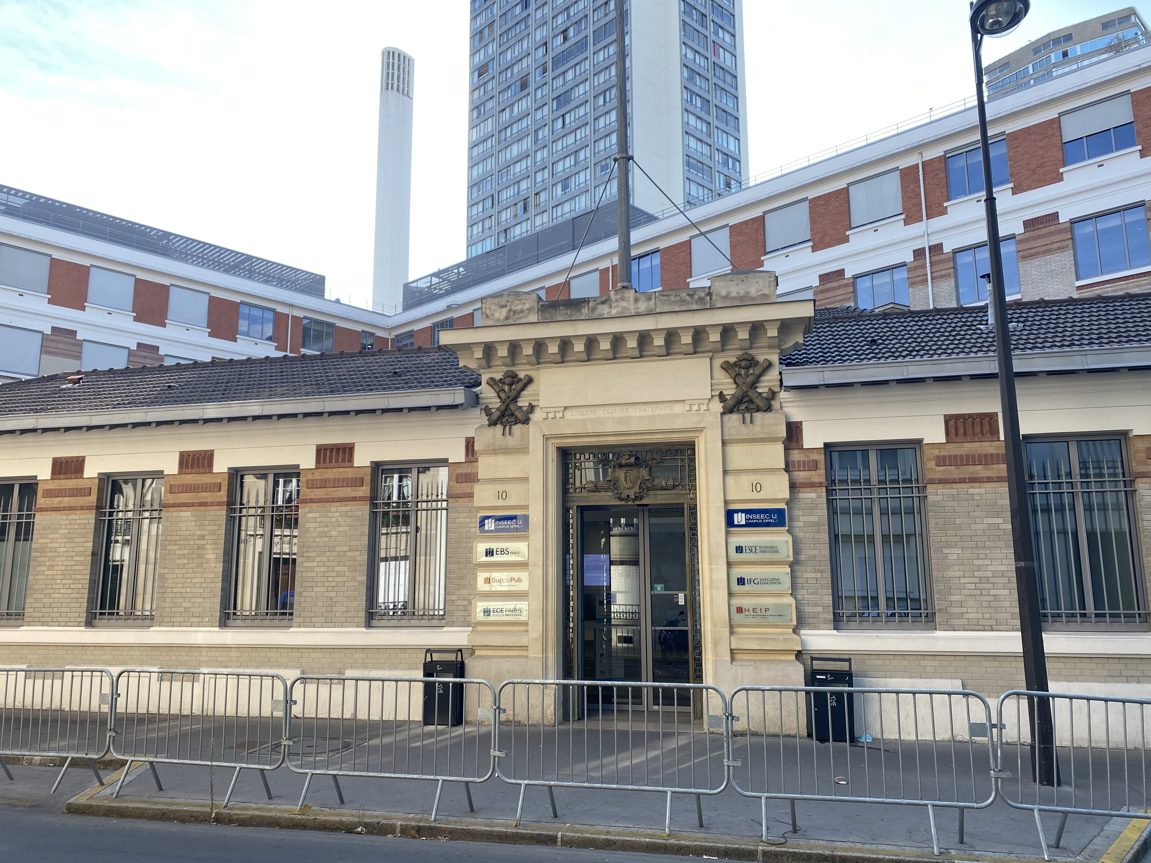 Campus Eiffel de l'INSEEC.U, l'ESCE International Business School, l'European Business School Paris, l'ECE Paris, l'IFG & Sup de Pub